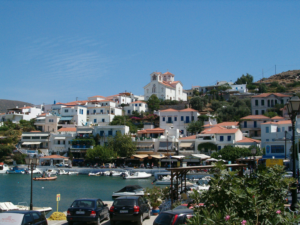 Batsi